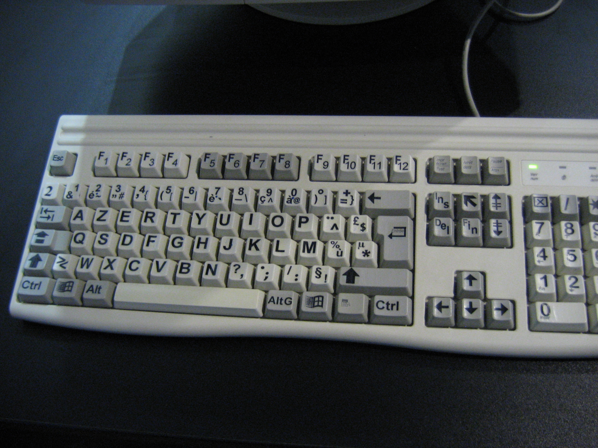 Description: Clavier à grosses lettres pour utilisateurs mal-voyant Source: Photographie prise par Matthieu Faure Date: 15 décembre 2005 Author: Matthieu Faure Permission: double licence GFDL-self et CC-BY-SA